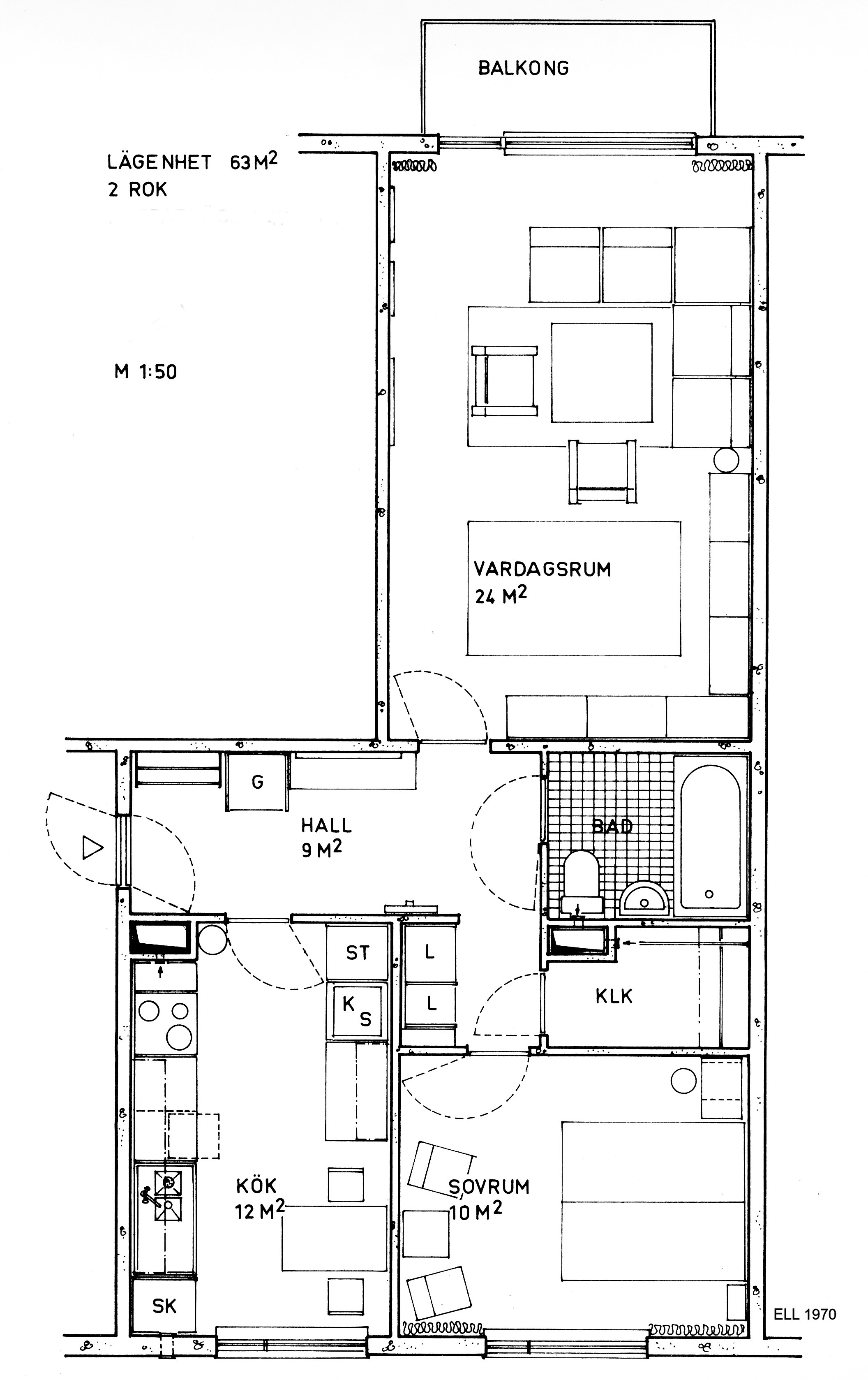 Typisk lägenhet i miljonprogrammet, två rum och kök, 63 m2 i Kallhäll